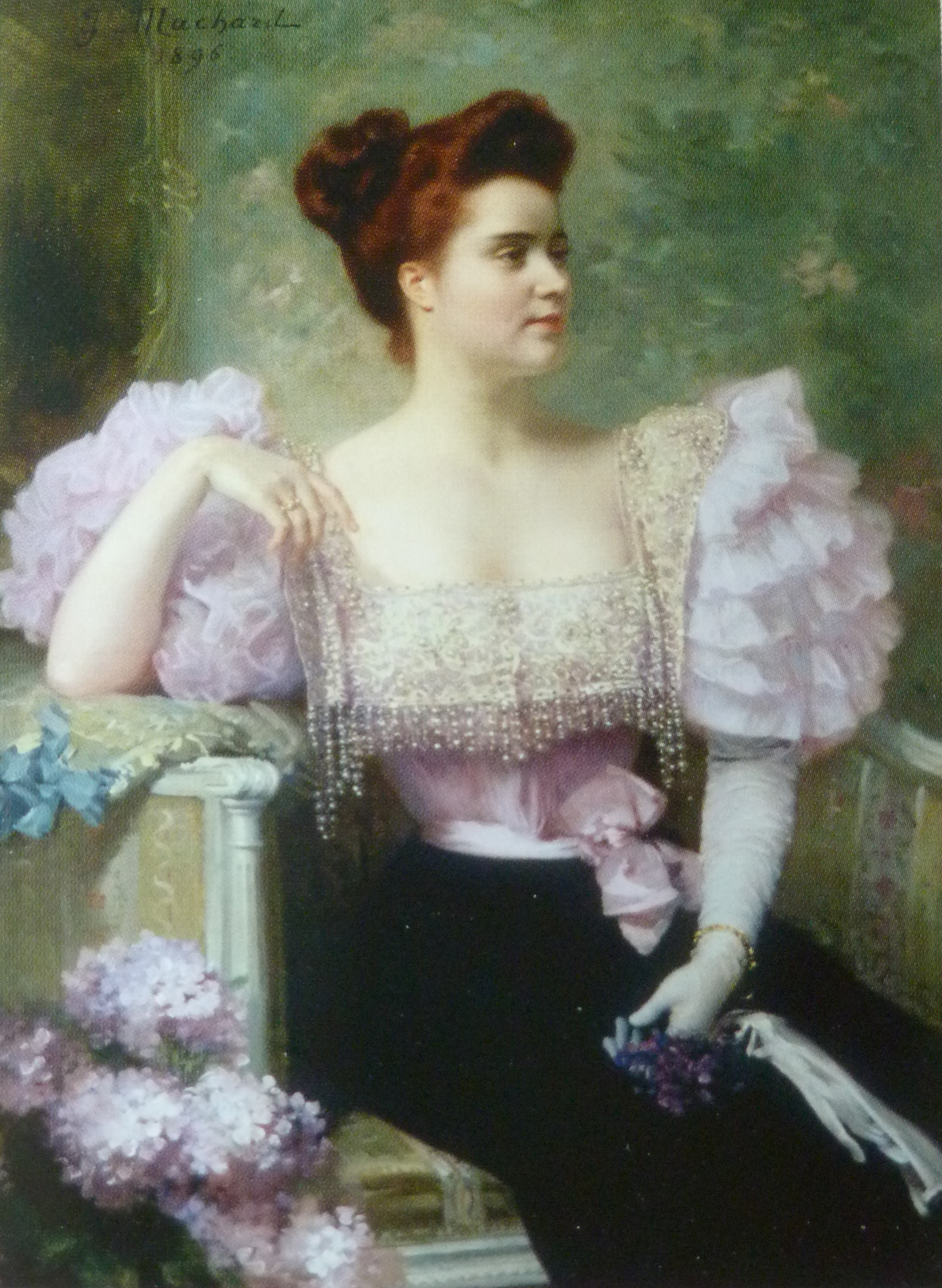 Jeune femme en tenue de soirée assise près d'un bouquet d'hortensias 127,6x93,3 cm